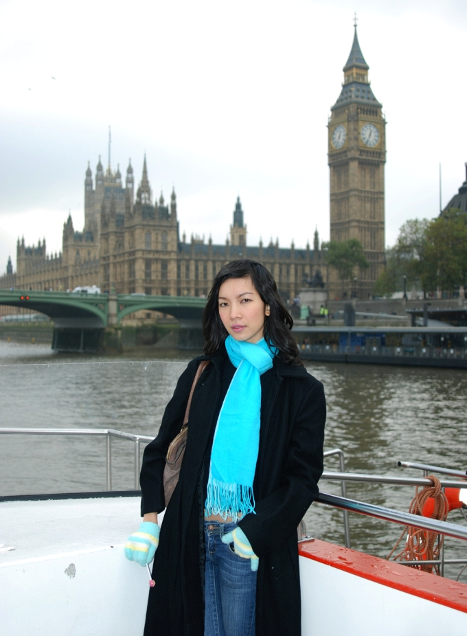 Xuân Lan trong một chuyến du lịch tại Anh quốc